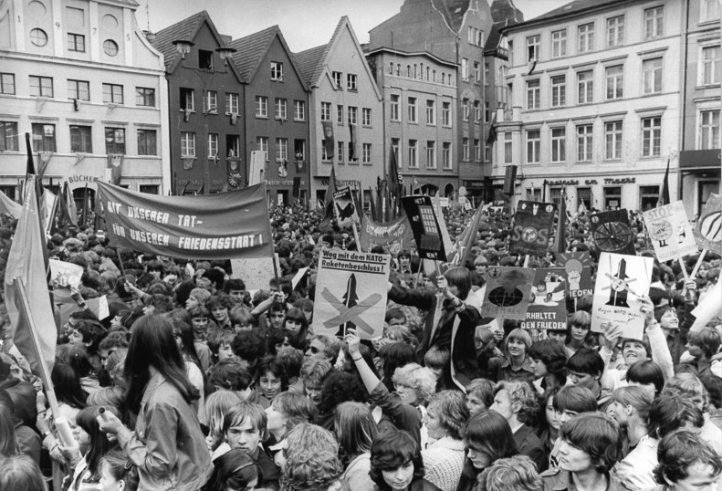 ADN-ZB-Pätzold-29.5.1982-eng-Scherin: Pfingsttreffen der Jugend-Nach einem Sternmarsch vereinten sich Tausende Jugendliche und weitere Einwohner der Bezirksstadt auf dem Marktplatz einer machtvollen Friedensmanifestation.